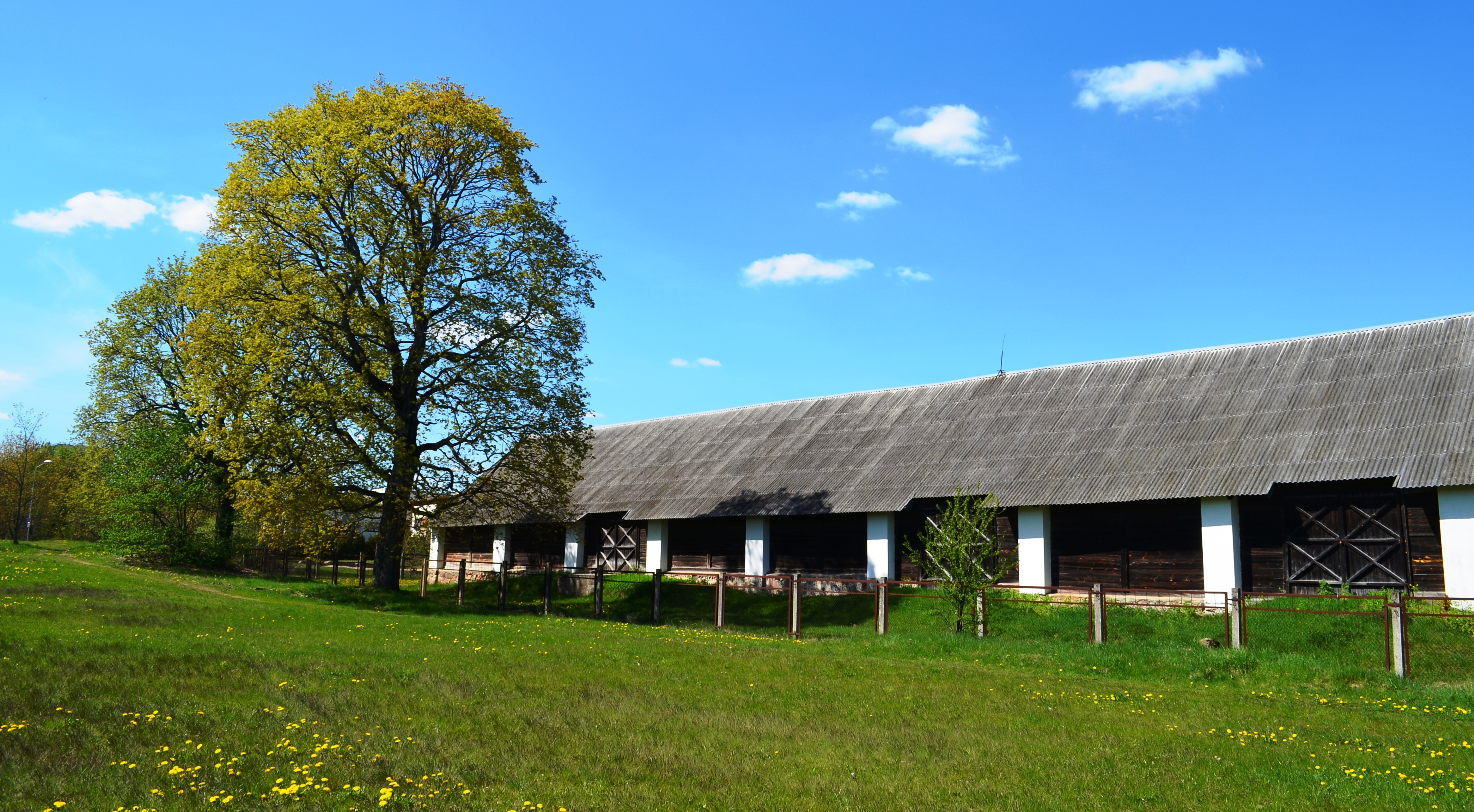 Verkių dvaro statinys (arklidės?), Verkių sen., Vilnius